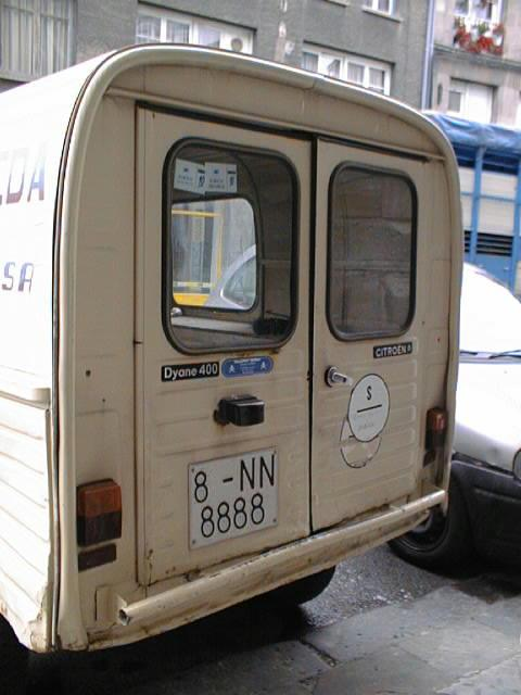 cliché personnel véhicule dérivés de la 2cv. Reprenant principalement la plateforme et la mécanique. les plaques d'immatriculation ont volontairement été masquées catégorie:2CV